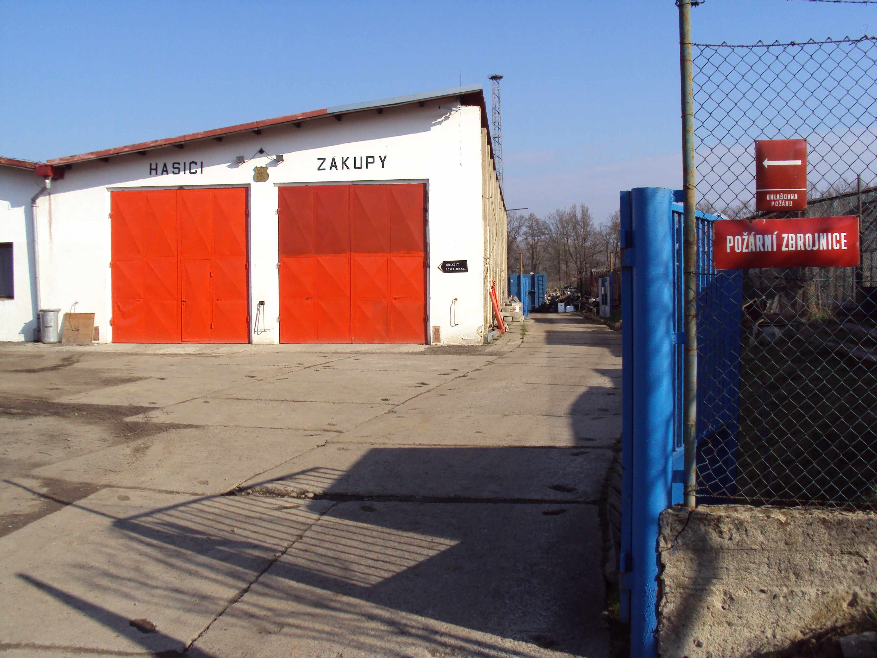 Česky: Požární zbrojnice zákupských hasičů v Gagarinově ulici